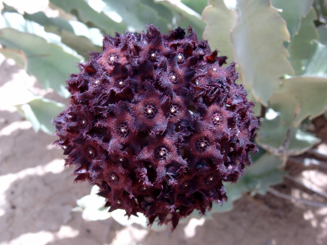 Caralluma acutangula (=C.retrospiciens) near Yomboli, Burkina Faso.